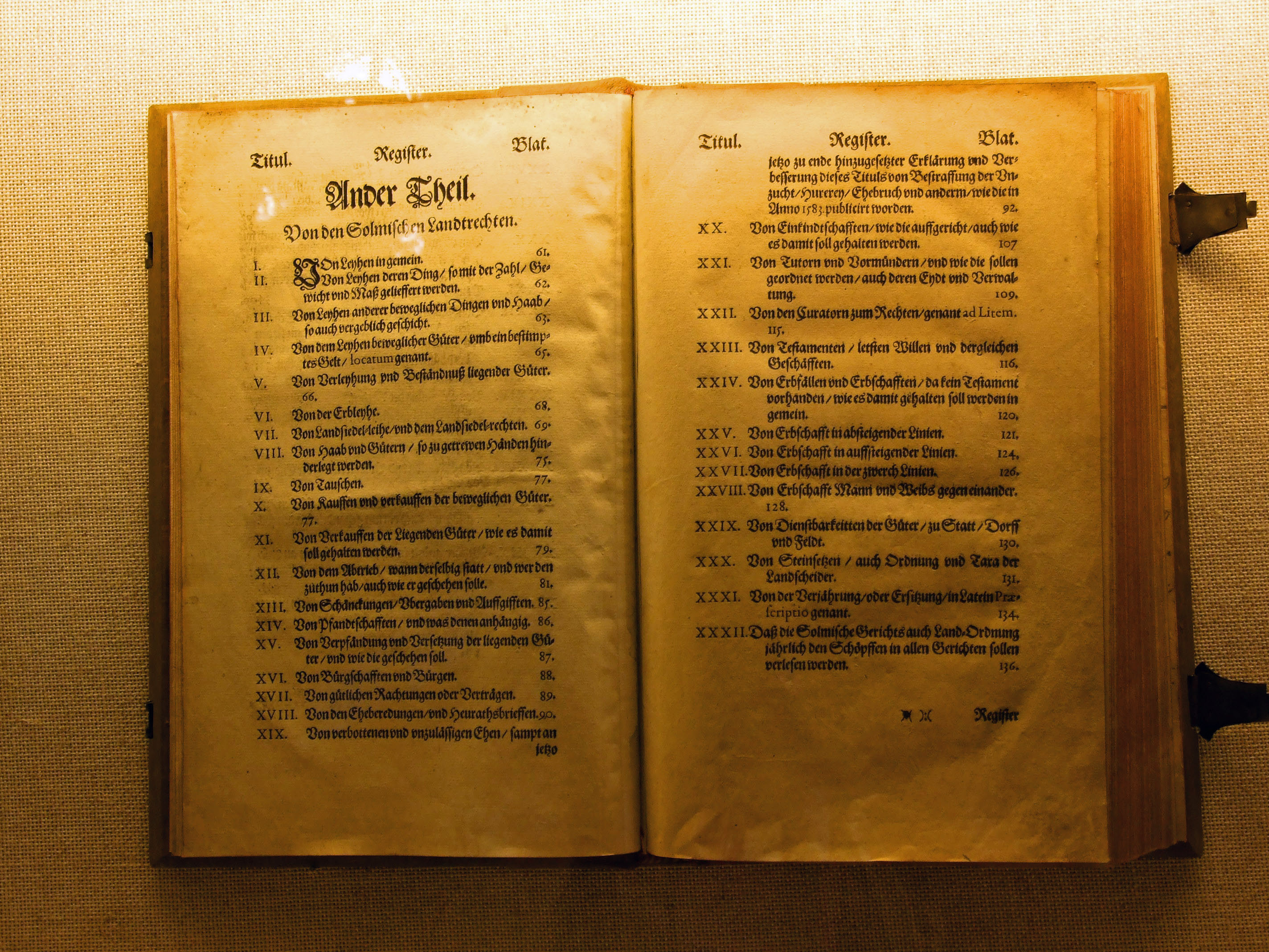 Gerichtsordnung aus dem 16. Jahrhundert ("Grafschafft Solms und Herrschafft Mintzenberg"), im Heimatmuseum Bergen-Enkheim